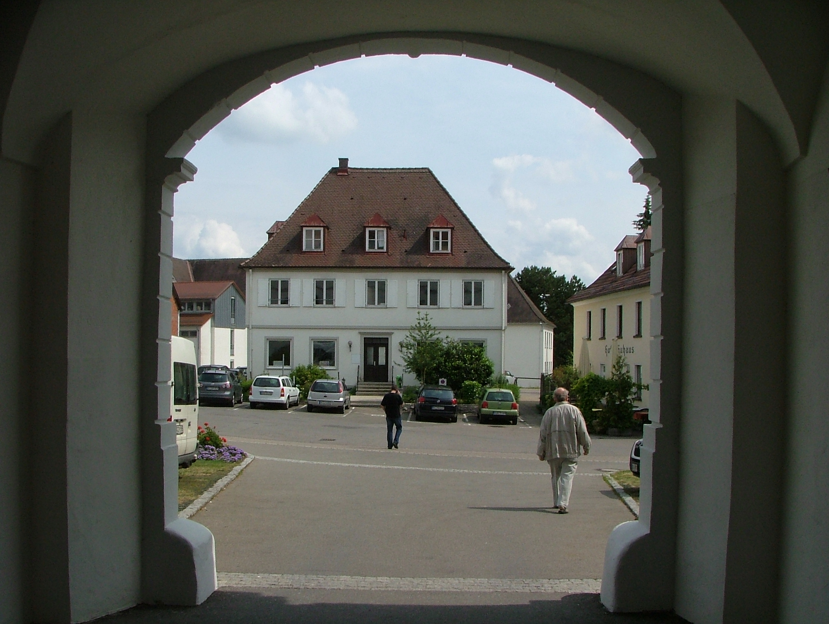 Ausblick